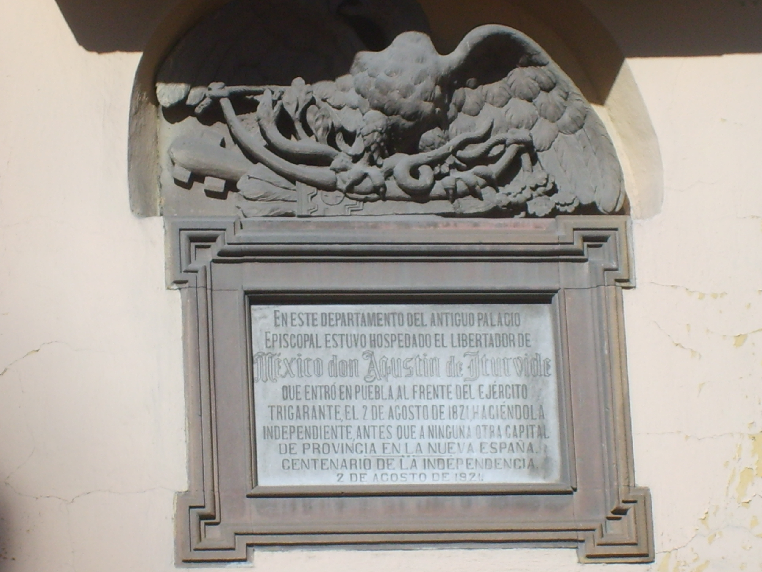 Placa que recuerda donde se hospedó Iturbide y la llegada del Ejercito Trigarante a Puebla